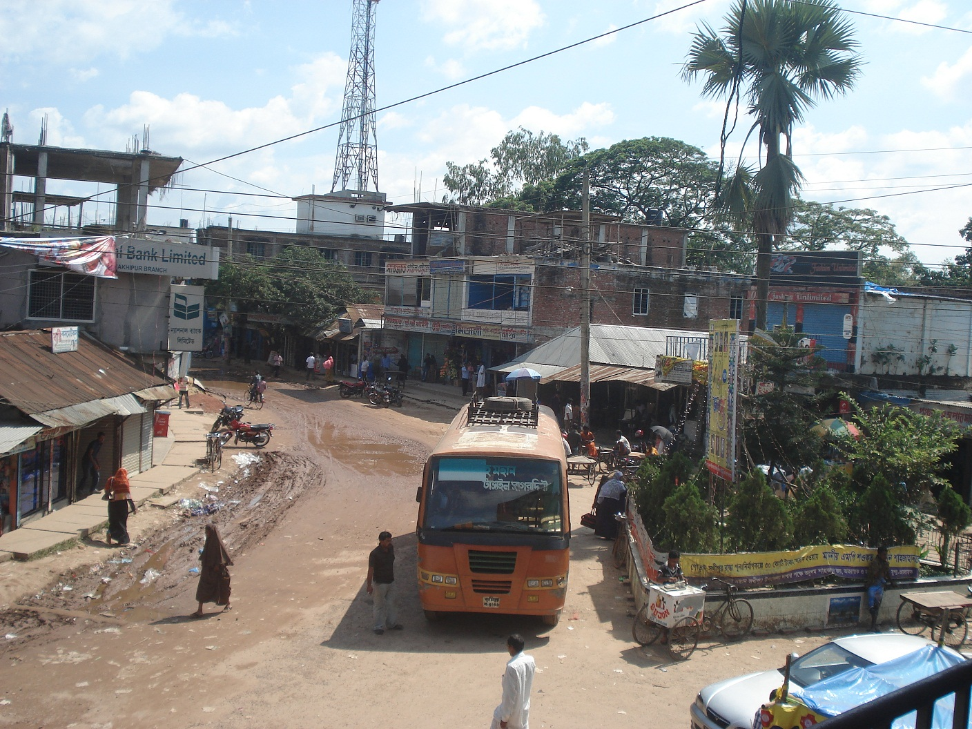 সখিপুর তালতলা চত্তর, সখিপুর, টাঙ্গাইল।